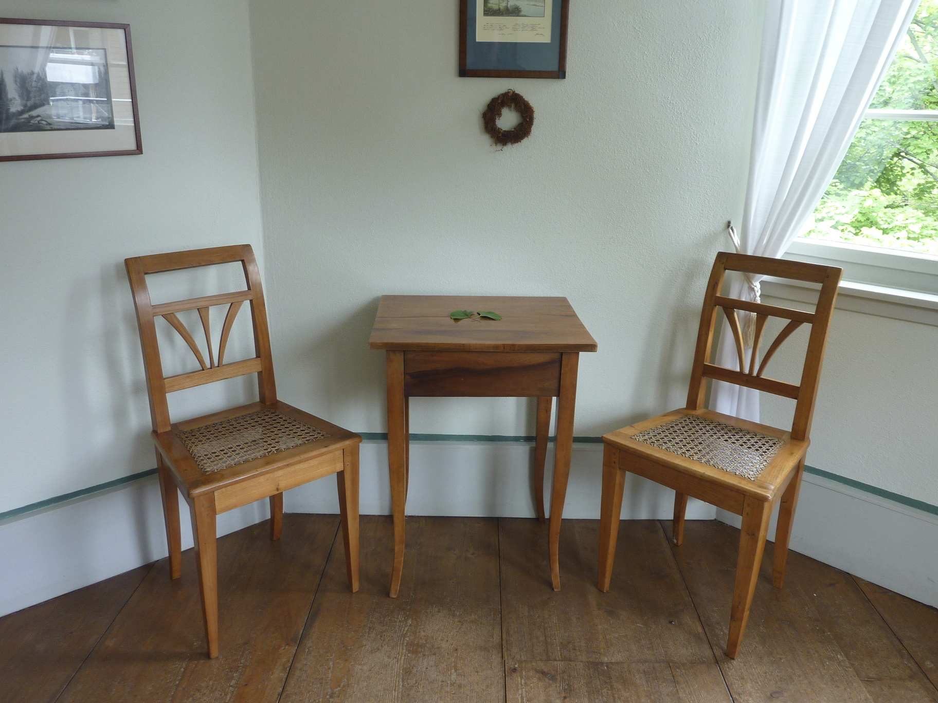 Frankfurt am Main, Stadtteil Sachsenhausen: Das Willemer-Häuschen oder Willemer-Gartenhaus ist ein klassizistisches Gartenhaus aus dem frühen 19. Jahrhundert. Bekannt wurde es durch die dortigen Begegnungen des Dichters Johann Wolgang von Goethe mit Marianne von Willemer im Jahr 1814. Im Zweiten Weltkrieg wurde das Originalgebäude zerstört und anschließend am selben Ort originalgetreu wieder aufgebaut. Heute befindet sich im Haus eine Goethe-Gedenkstätte. Das Foto zeigt einen Sitzplatz mit klassizistischen Möbeln im zweiten Obergeschoss an der Nordwestwand des Raumes